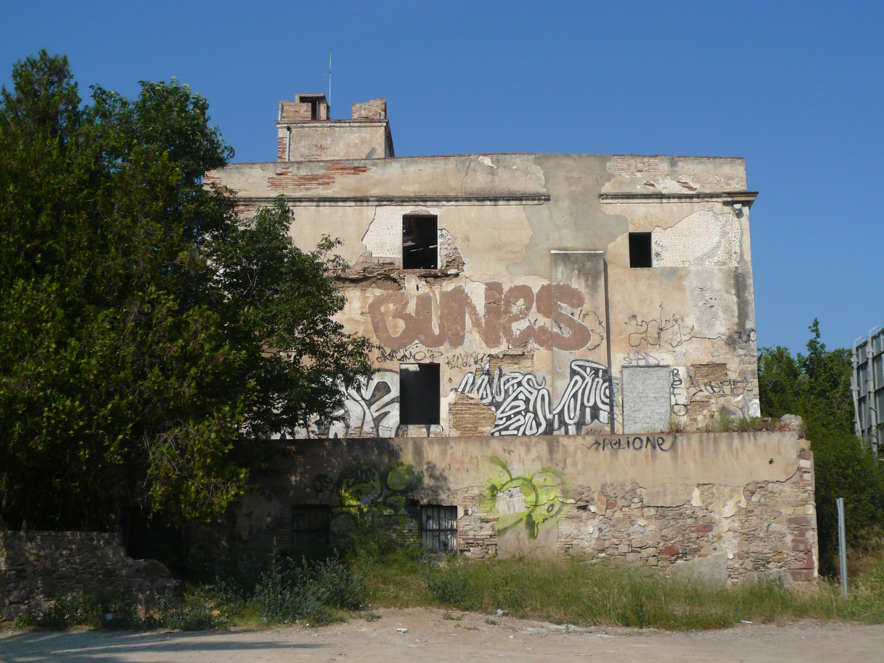 Tennis Despí, Can Jaume Bo, Torre dels Perdals. Camí del Mig, disseminat 21 (Sant Joan Despí). Object location41° 22′ 24.86″ N, 2° 02′ 51.62″ E